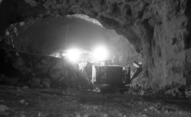 Katarinaberget. Ett blivande bergskyddsrum, som i fredstid ska fungera som garage.